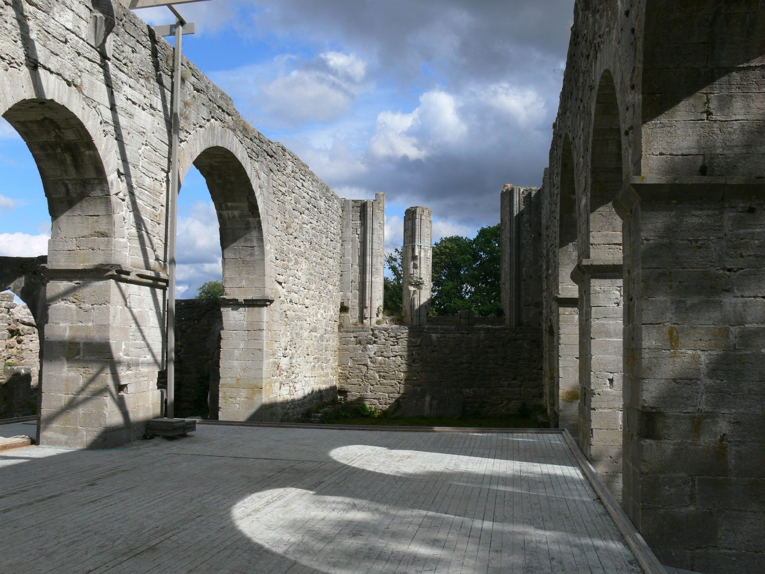 Roma kungsgard auf Gotland. Ruine der Klosterkirche von 1164